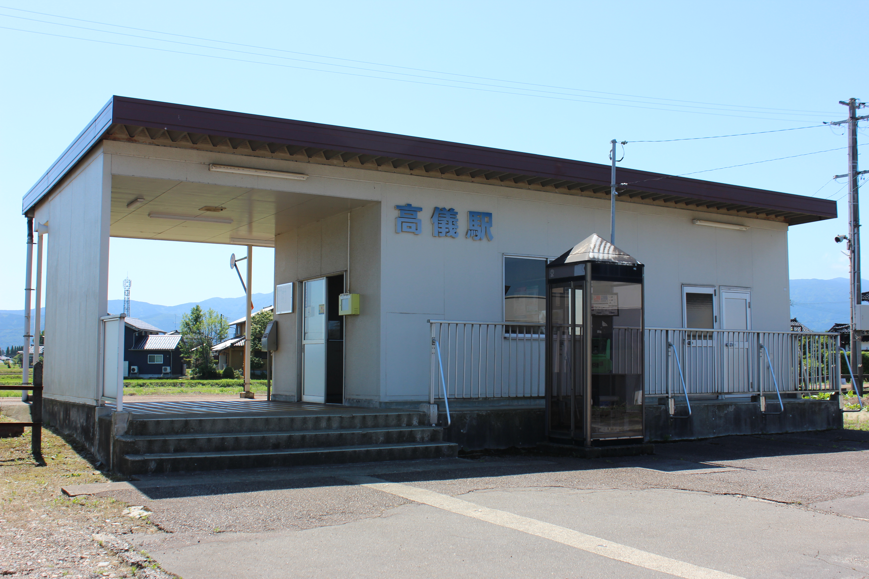 JR城端線高儀駅（富山県南砺市） Canon EOS Kiss X5